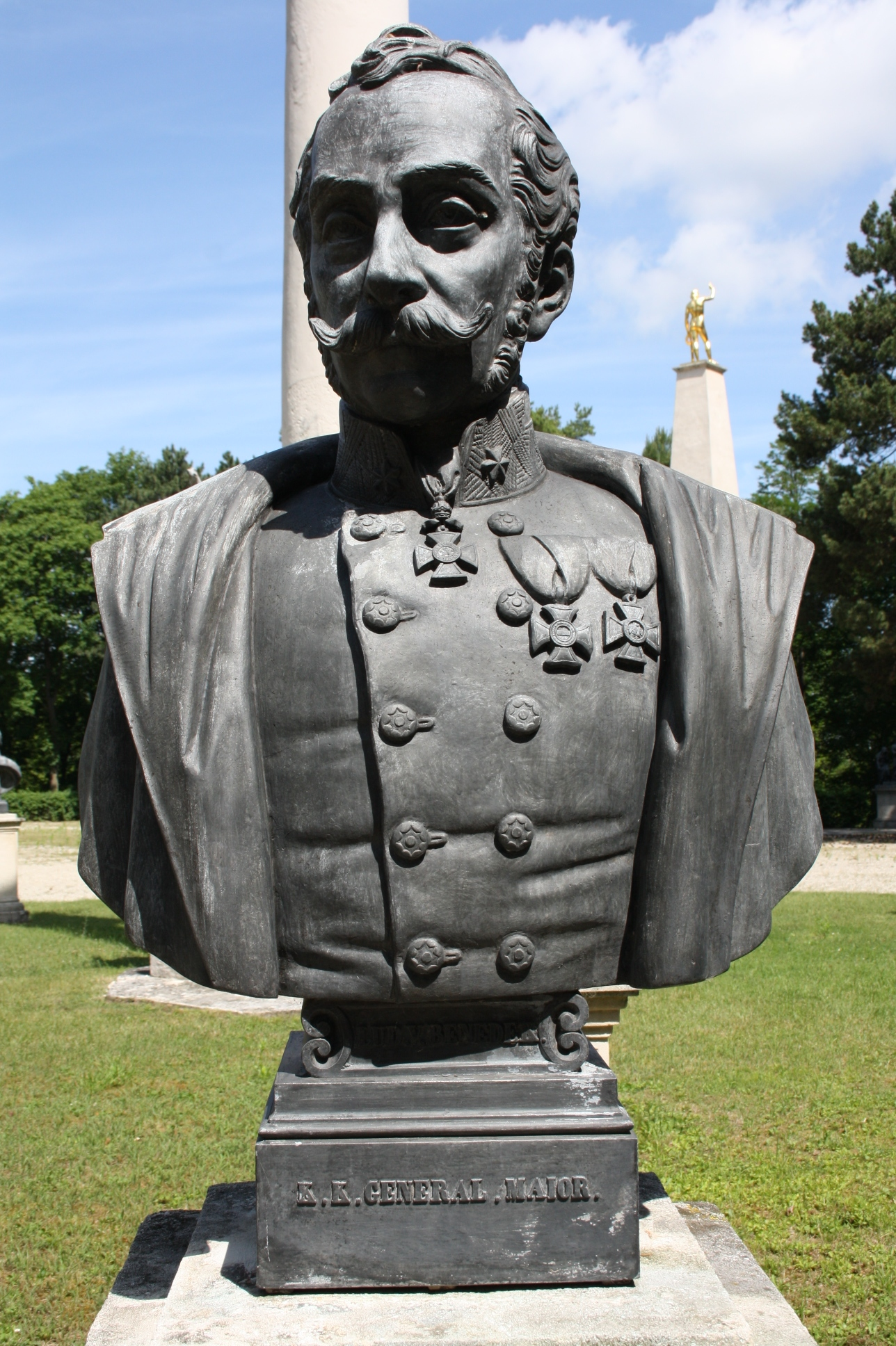 Büste in der Gedenkstätte Heldenberg (Niederösterreich)